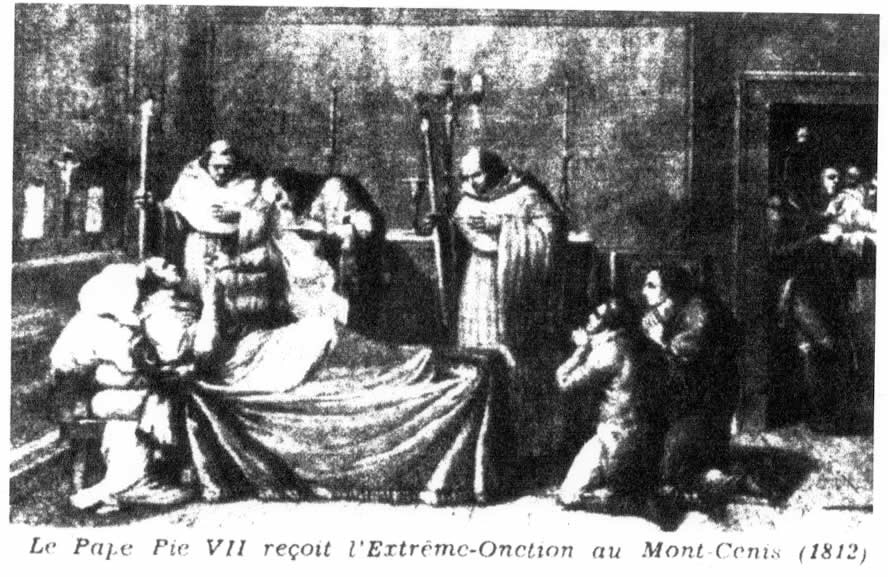 Gravure décrivant Le pape recevant l'extrême onction au Mont-Cenis lors de son voyage vers Fontainebleau en 1812